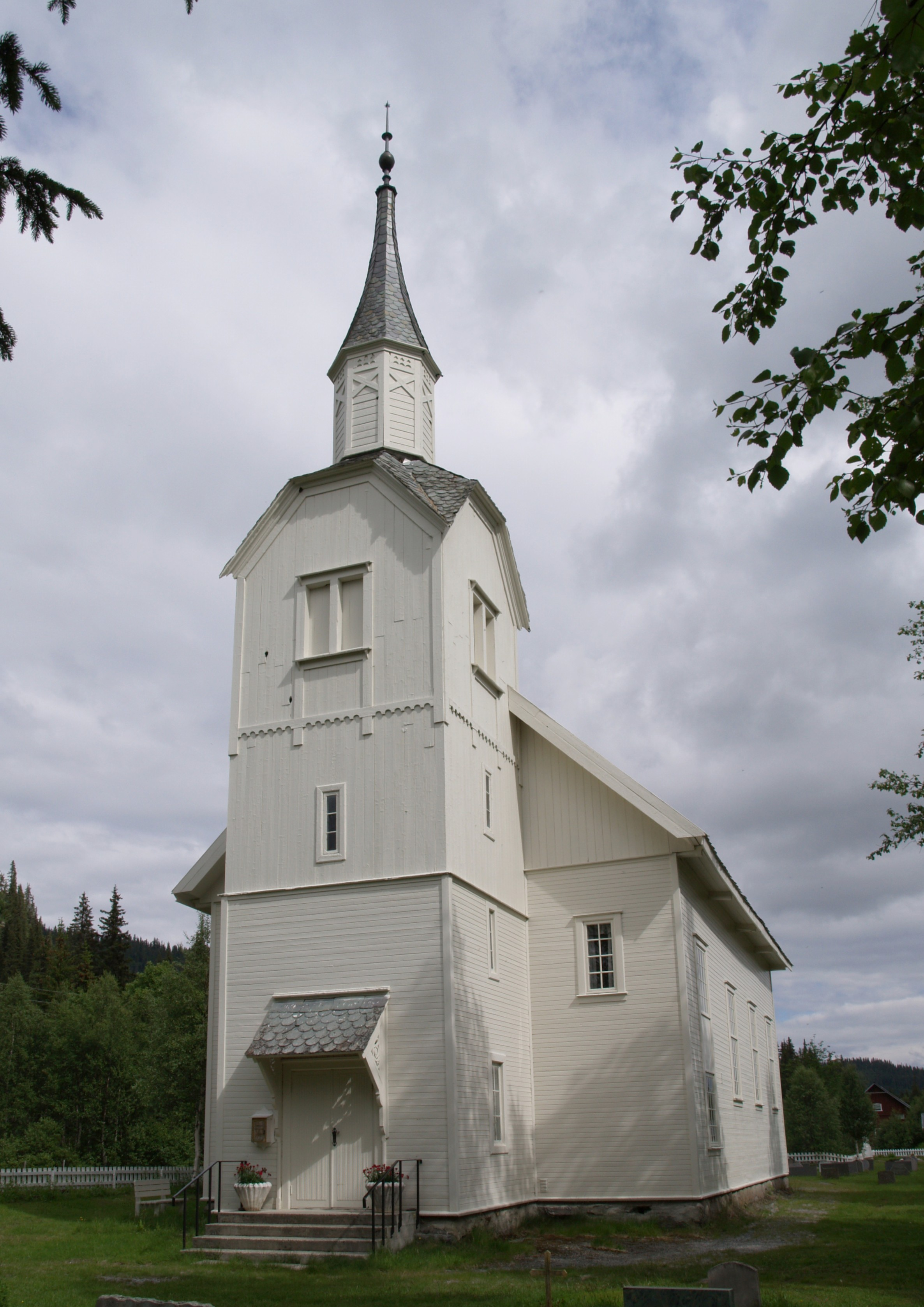 Nord-Etnedal kirke, Etnedal. See Nord-Etnedal kirke.